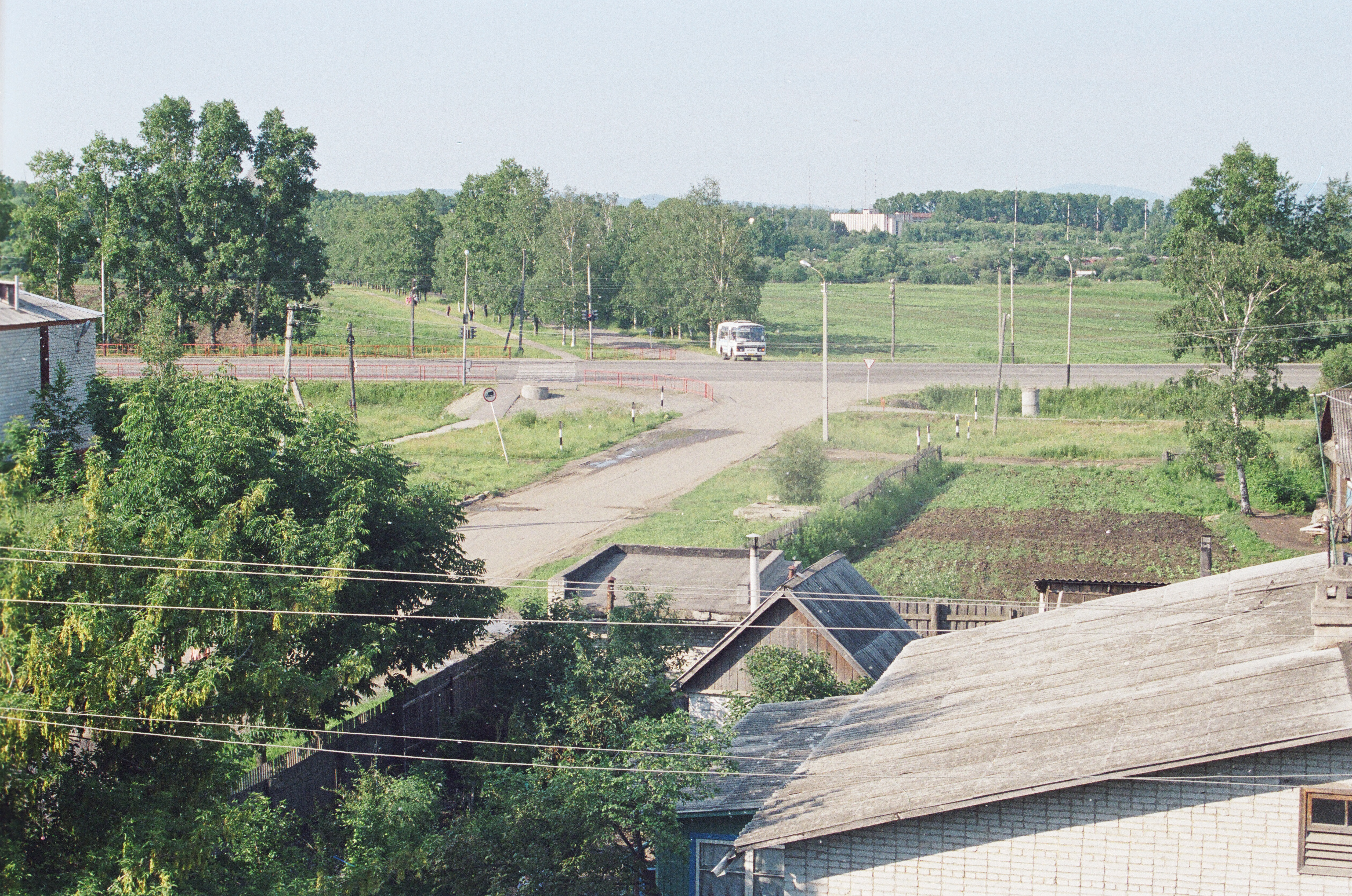 Село Восточное. Въезд.